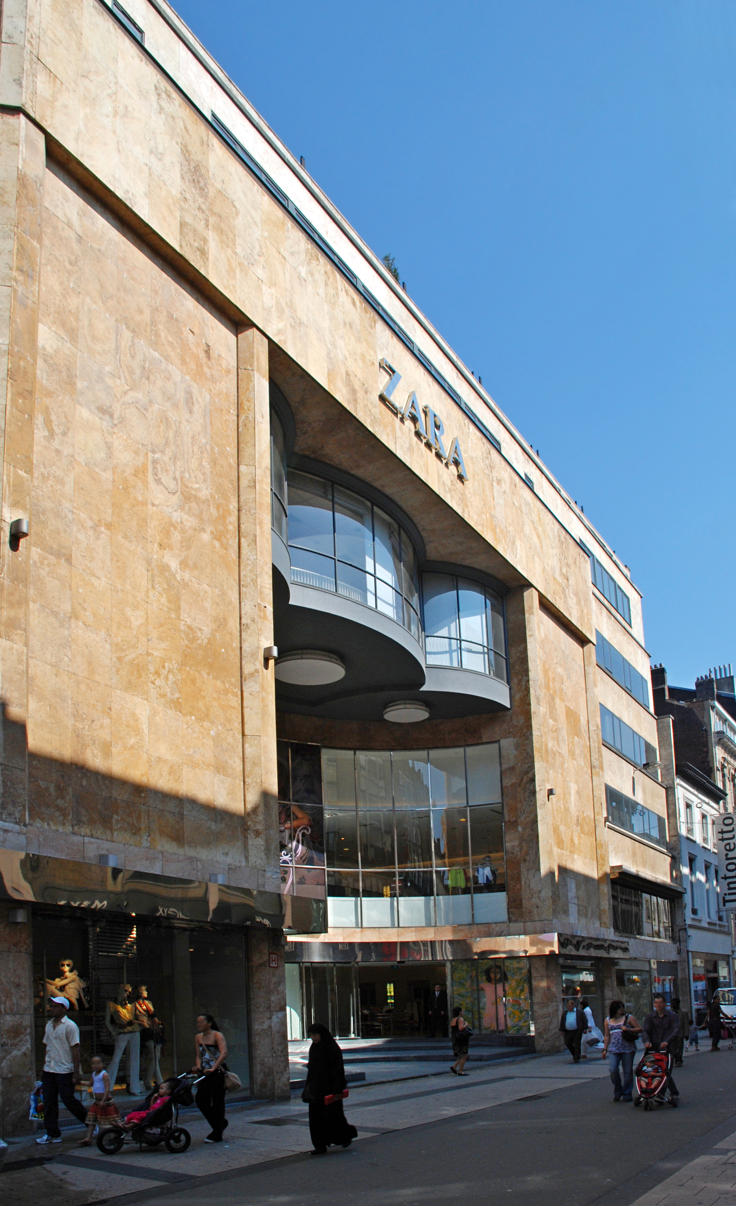 Belgique - Bruxelles - Cinéma Métropole (Adrien Blomme, Art déco)